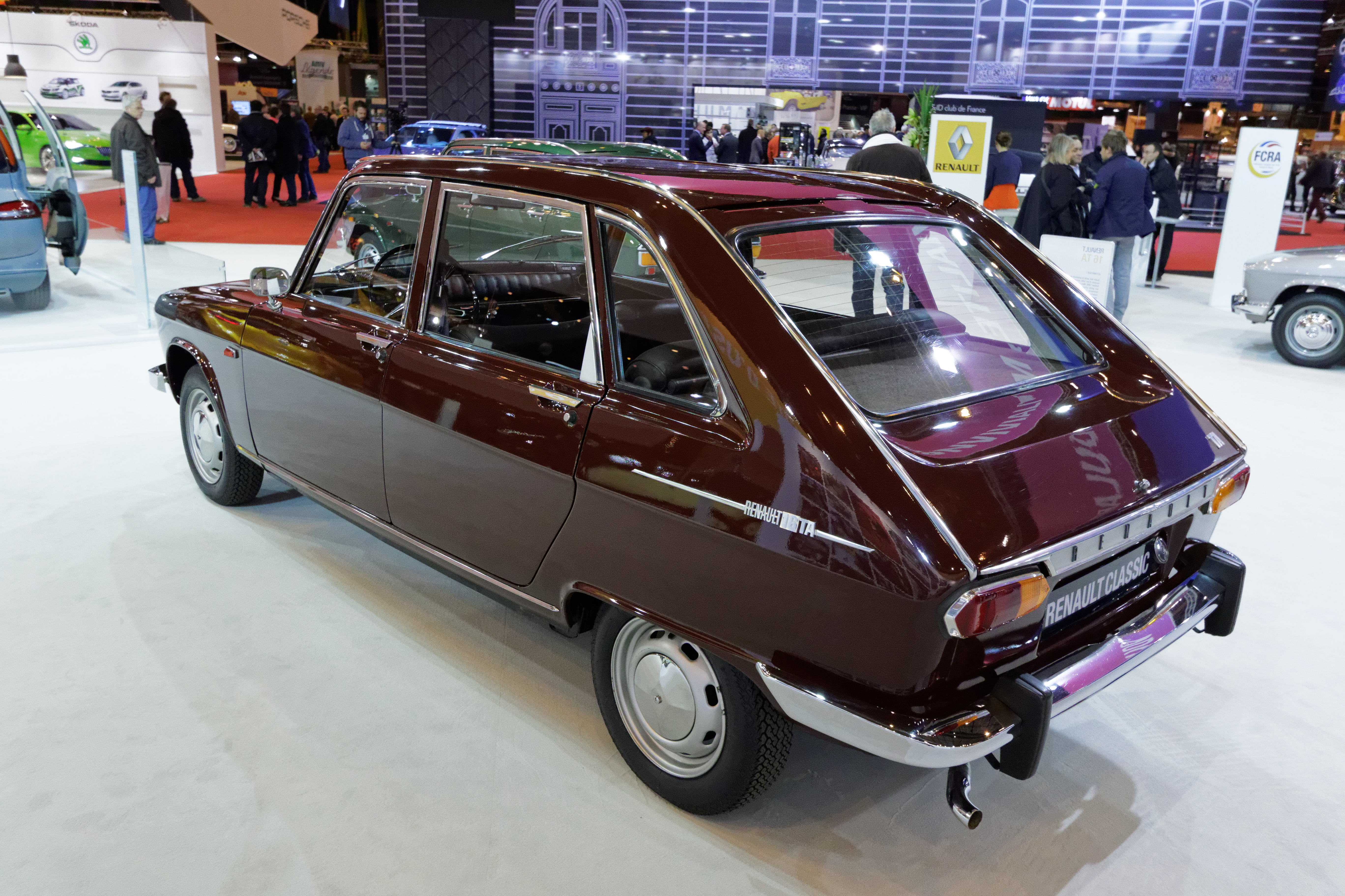 Une des voiture présentée lors du salon Rétromobile de Paris 2015